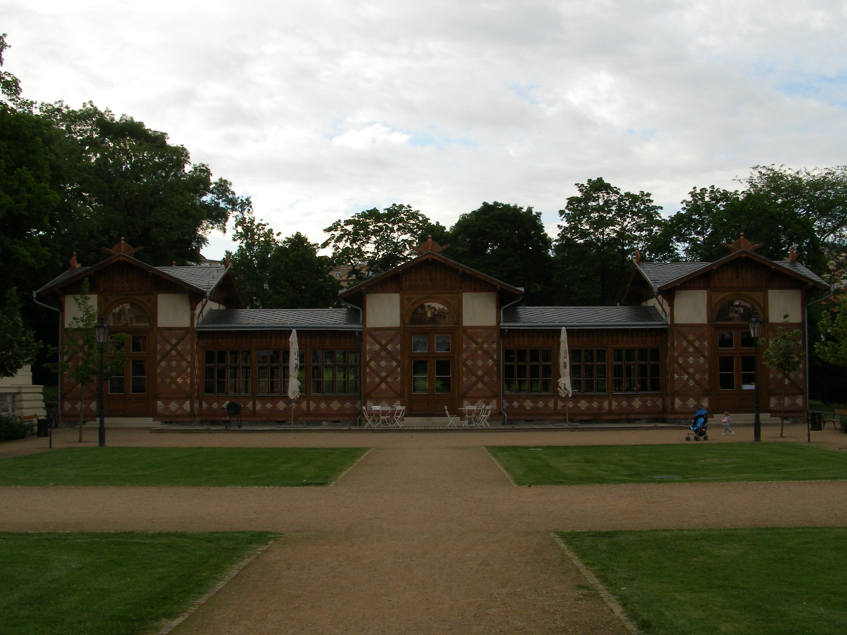 Havlíčkovy sady, herna vybudovaná v 70. letech 19. století podle návrhu Josefa Schulze. Původně sloužil pavilon jako zahradní herna se střelnicí, kuželnou, šachovými stoly a dalšími atrakcemi, kde si mohli návštěvníci tehdejšího areálu odpočinout a odreagovat se. Pavilon později během 20. století sloužil jako jesle nebo hospoda.